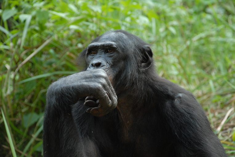 Pan paniscus